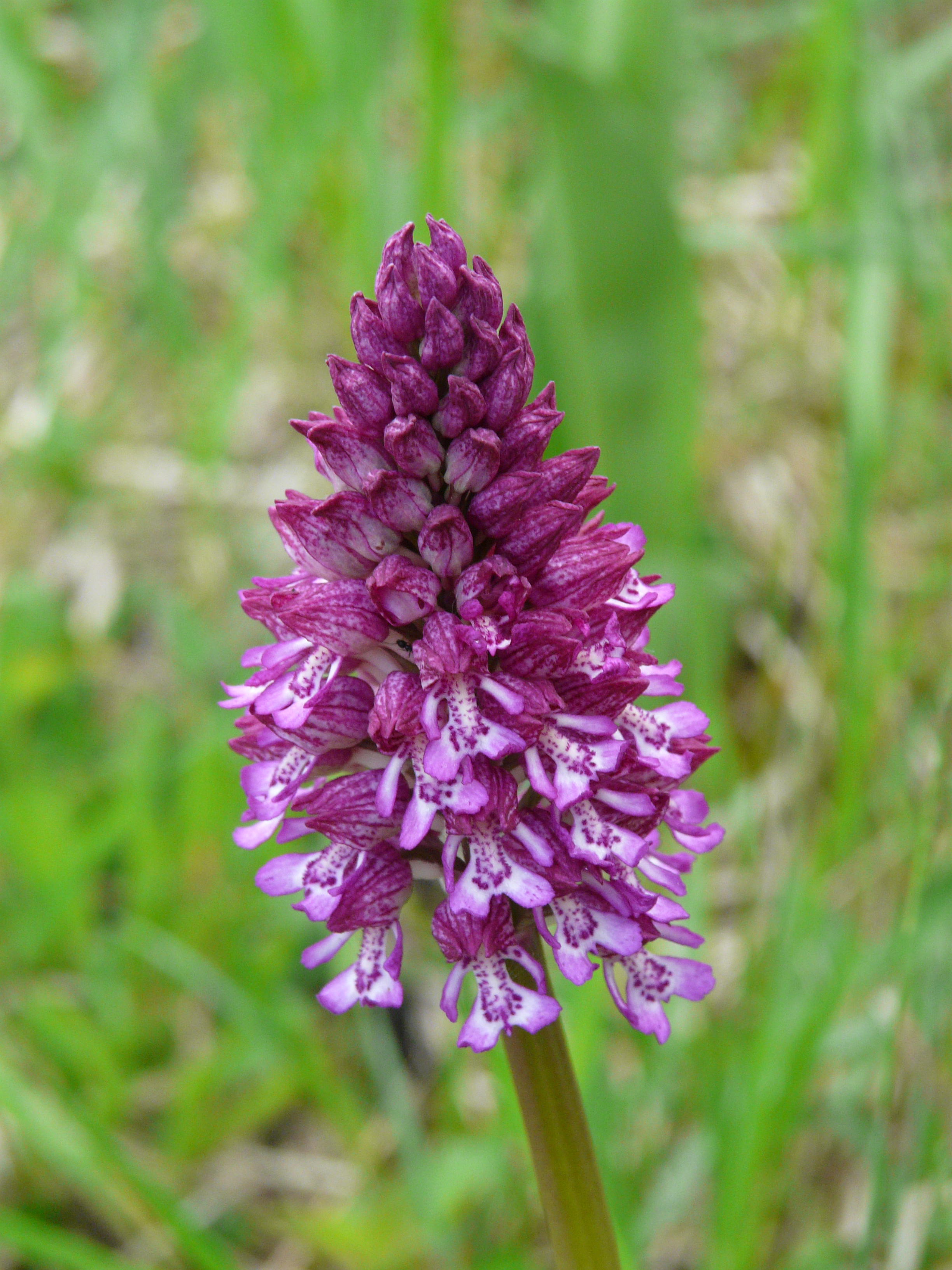 Orchis x hybrida, hybride probable de Orchis purpurea et Orchis militaris, Saint-Amand-de-Coly, Dordogne, France